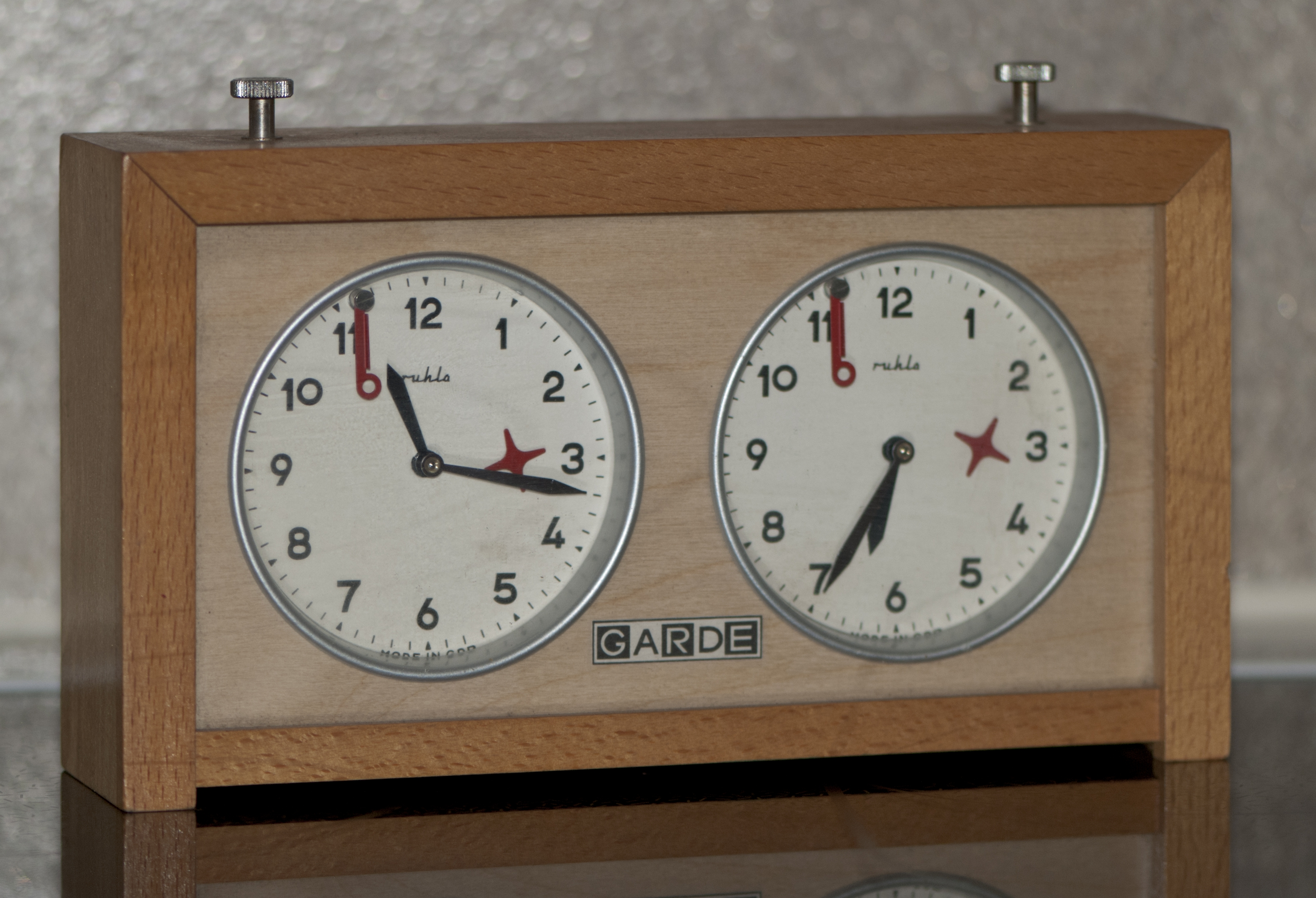 "GARDE"-Schachuhr, mechanisch Funktion der einzelnen Teile: oben 2 über eine Wippe gekoppelte Schalter, über die immer nur eine Uhr eingeschaltet werden kann die Zahlen geben Stunden an, nicht die korrekte Uhrzeit der Minutenzeiger hebt das über der 11 angebrachte Blättchen, auch Fähnchen oder Plättchen an; der Fall des Blättchens zeigt das Überschreiten der Bedenkzeit an, bei der GARDE-Uhr auch durch ein Geräusch der rote Stern neben der 3 zeigt durch Drehung, dass die Uhr geht, da kein Sekundenzeiger vorhanden ist